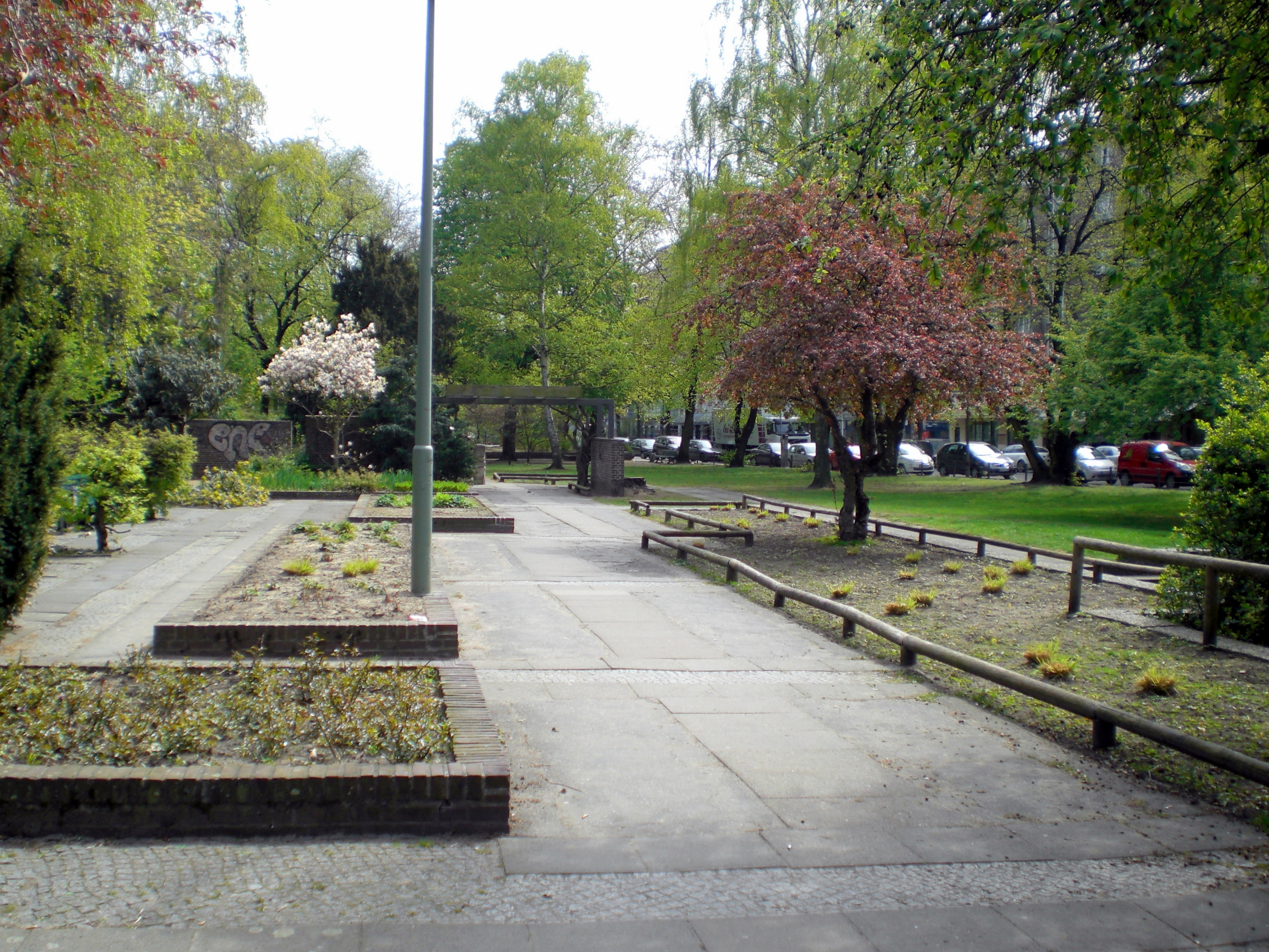 Berlin-Wilmersdorf Olivaer Platz